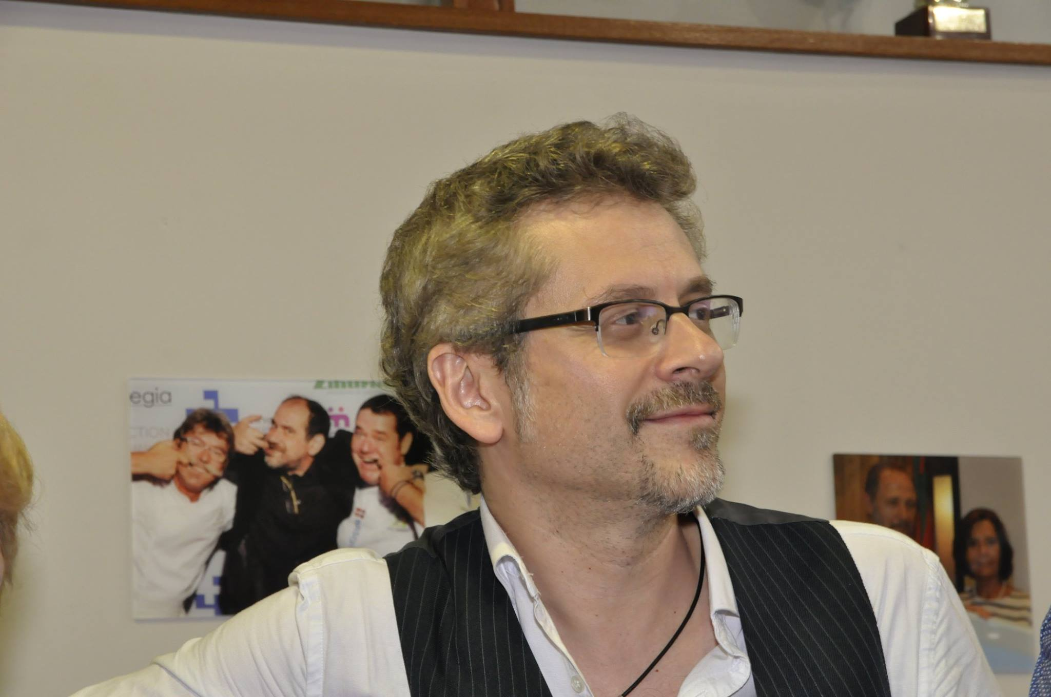 Juanma Bajo Ulloa, Ramon Labayen sari banaketan